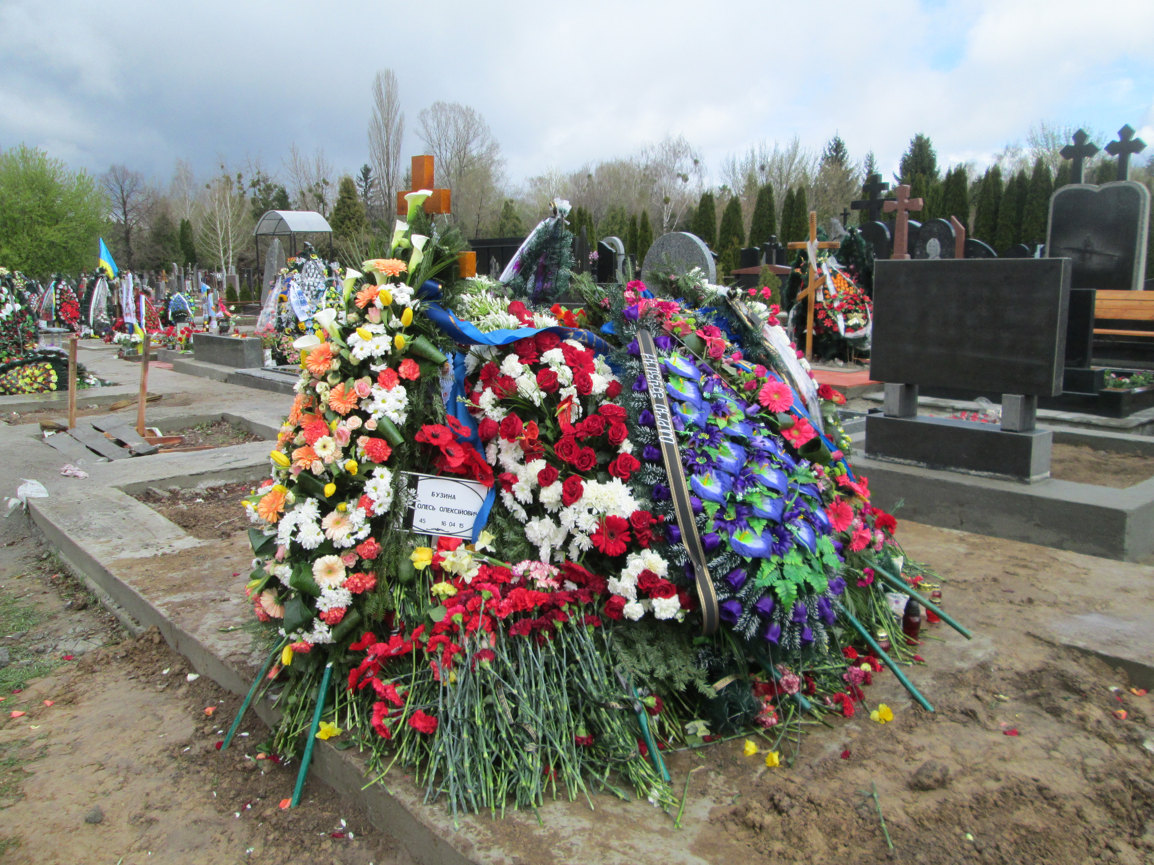 Могила Олеся Бузини на Берківцях